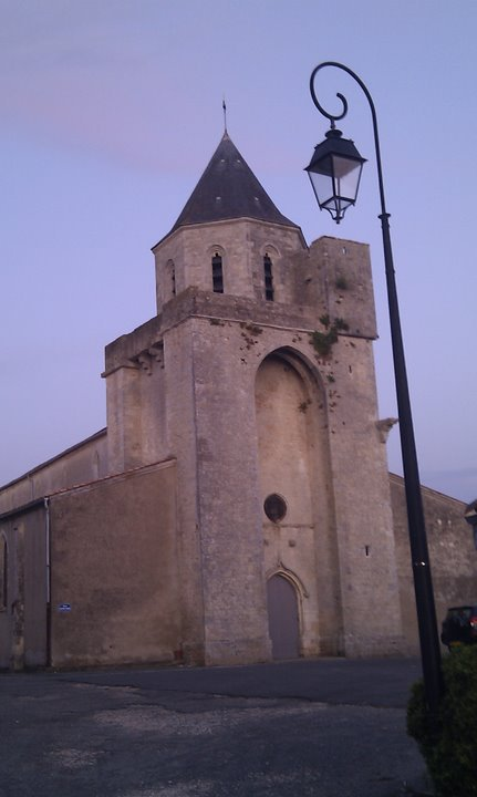 Thairé, Place de l'Eglise